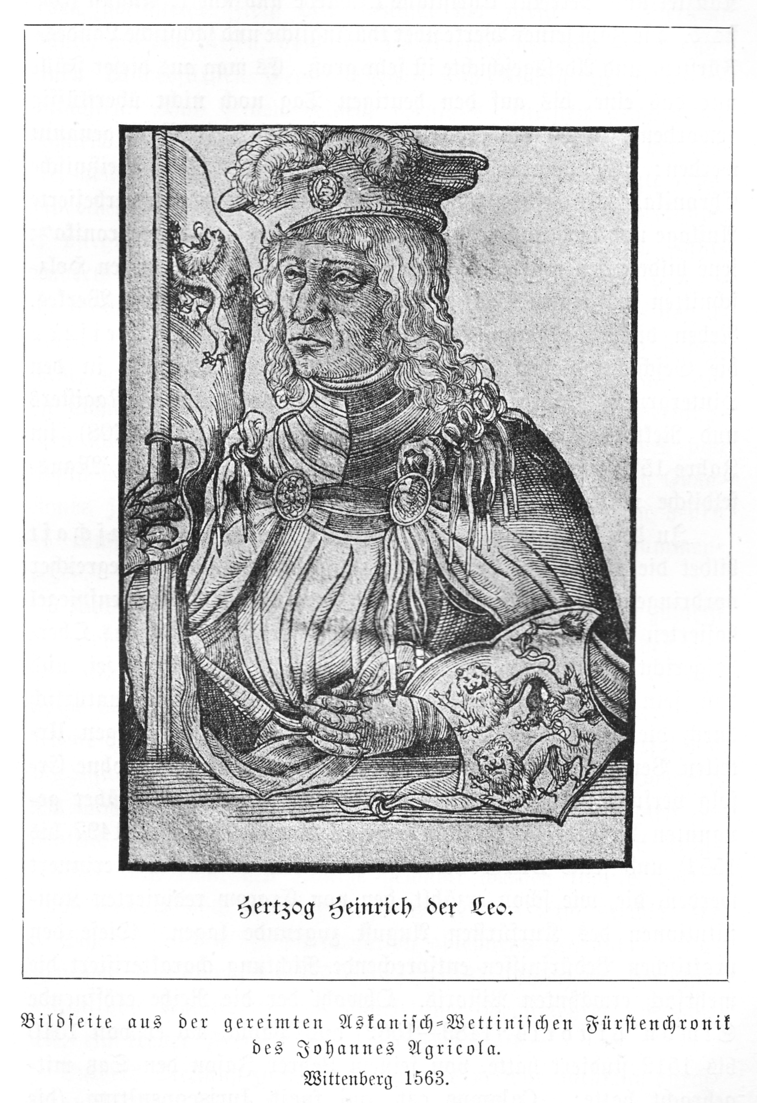 Bildseite aus der gereimten Askanisch-Wettinischen Fürstenchronik des Johannes Agricola. Wittenberg 1563. Digitalisat des kompletten Werkes